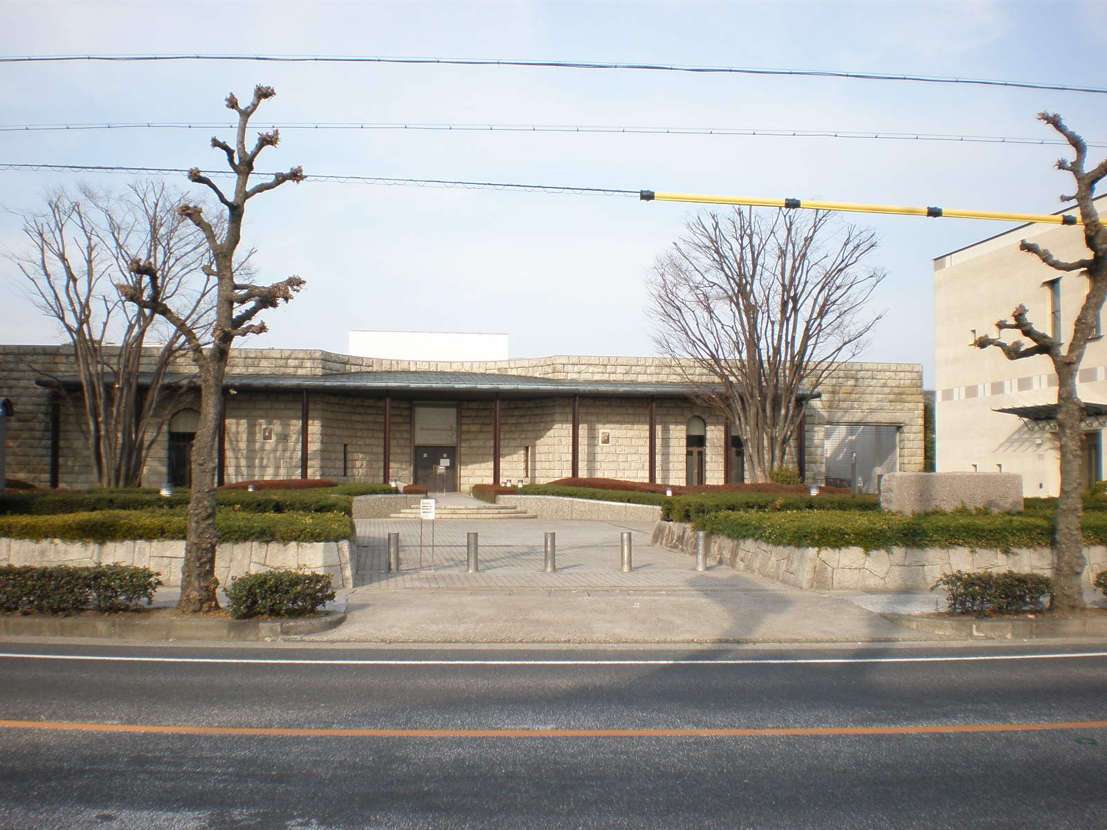 愛知県小牧市にあるメナード美術館